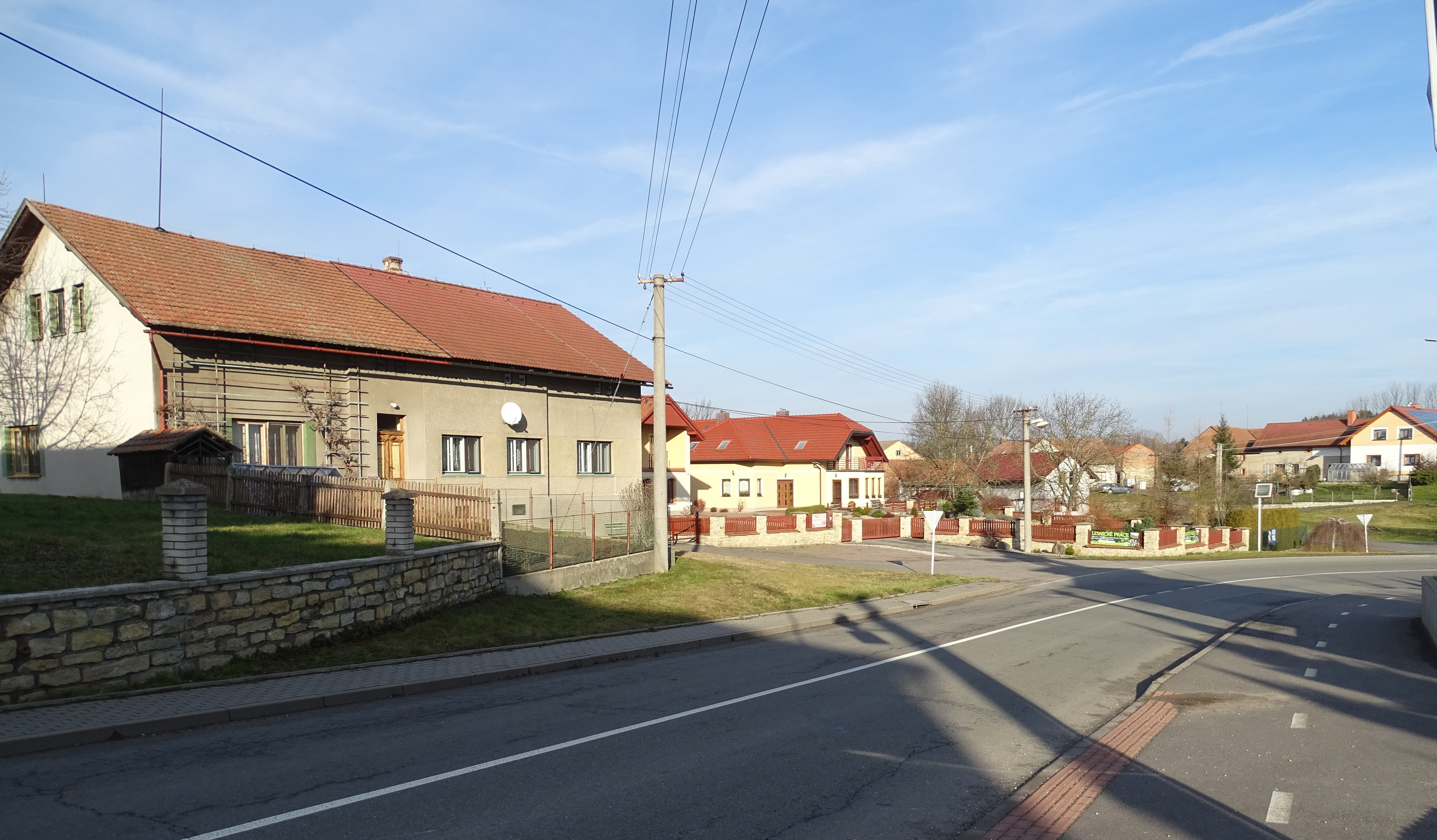 střed a náves obce